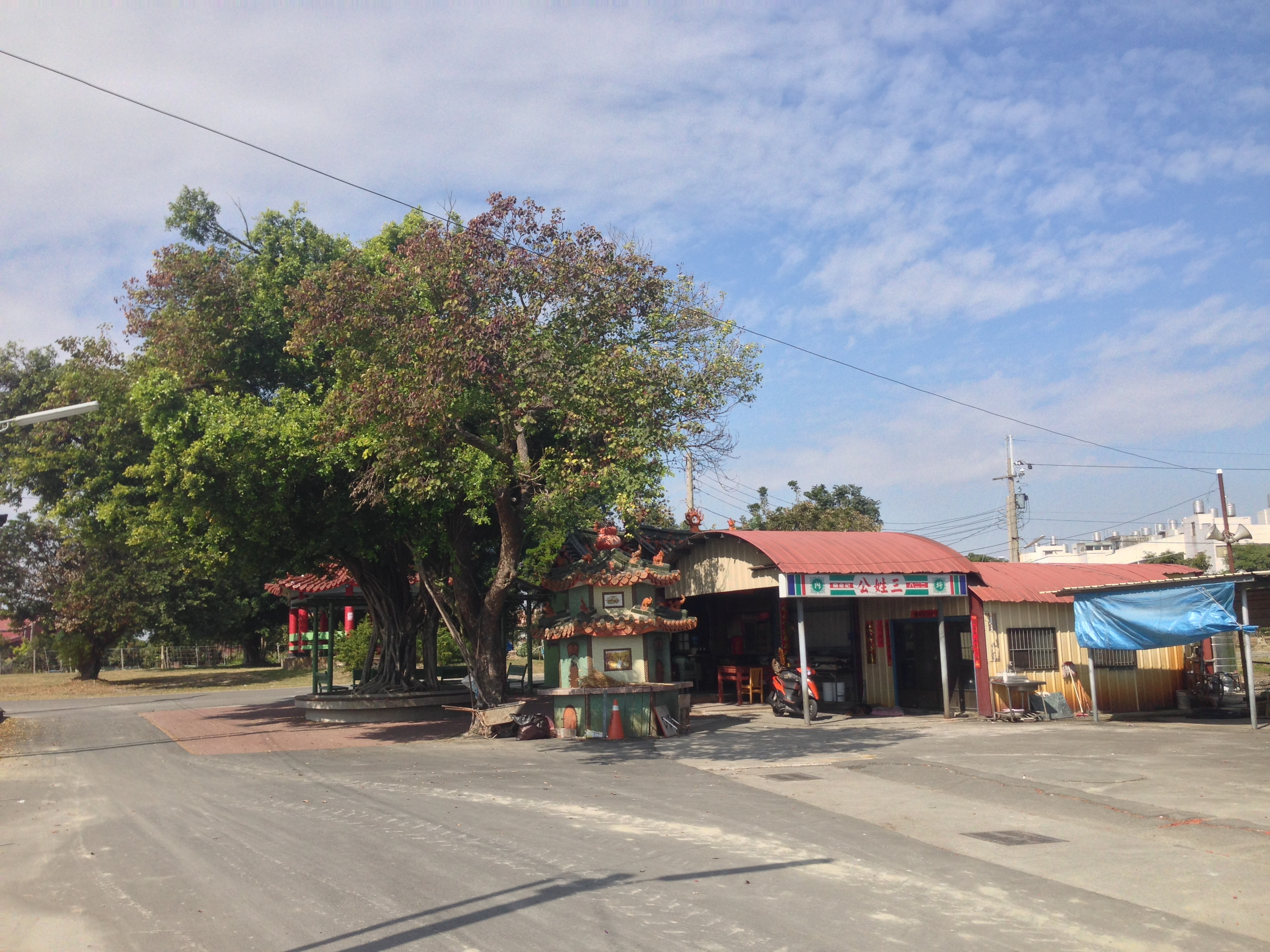 虎尾三姓公廟